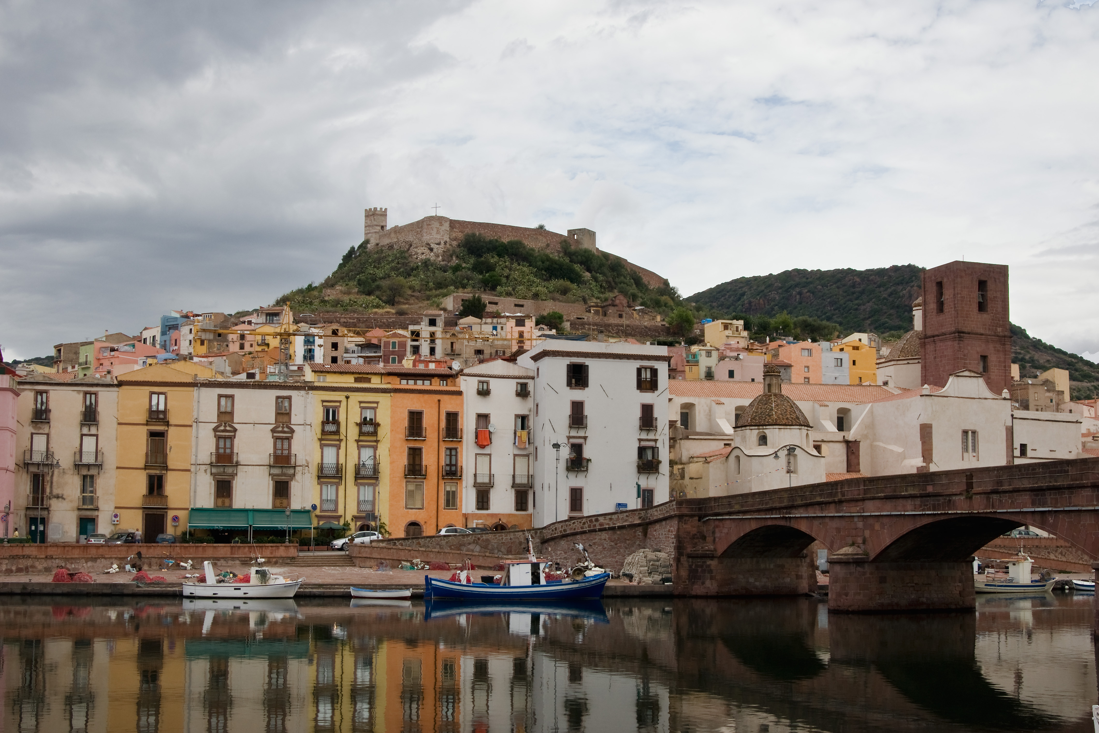 Centro Storico This is a photo of a monument which is part of cultural heritage of Italy.